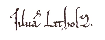 oudste vermelding van Lieshout in een oorkonde van koning Koenraad III